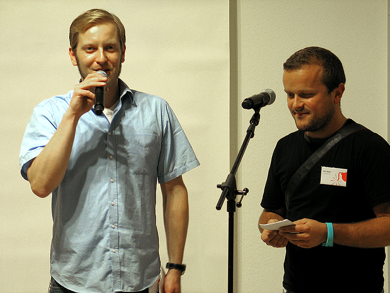 Die Künstler Christian Donner (links am Mikrofon) und Edin Bajric eröffneten mit einer kurzen Rede die Vernissage der ART (F)AIR 2012, Messe für zeitgenössische Kunst, vom 20. Oktober bis 11. November in der "Kulturetage des Einrichtungshauses SofaLoft, Jordanstraße 26, D - 30173 Hannover (Stadtteil Südstadt) ...